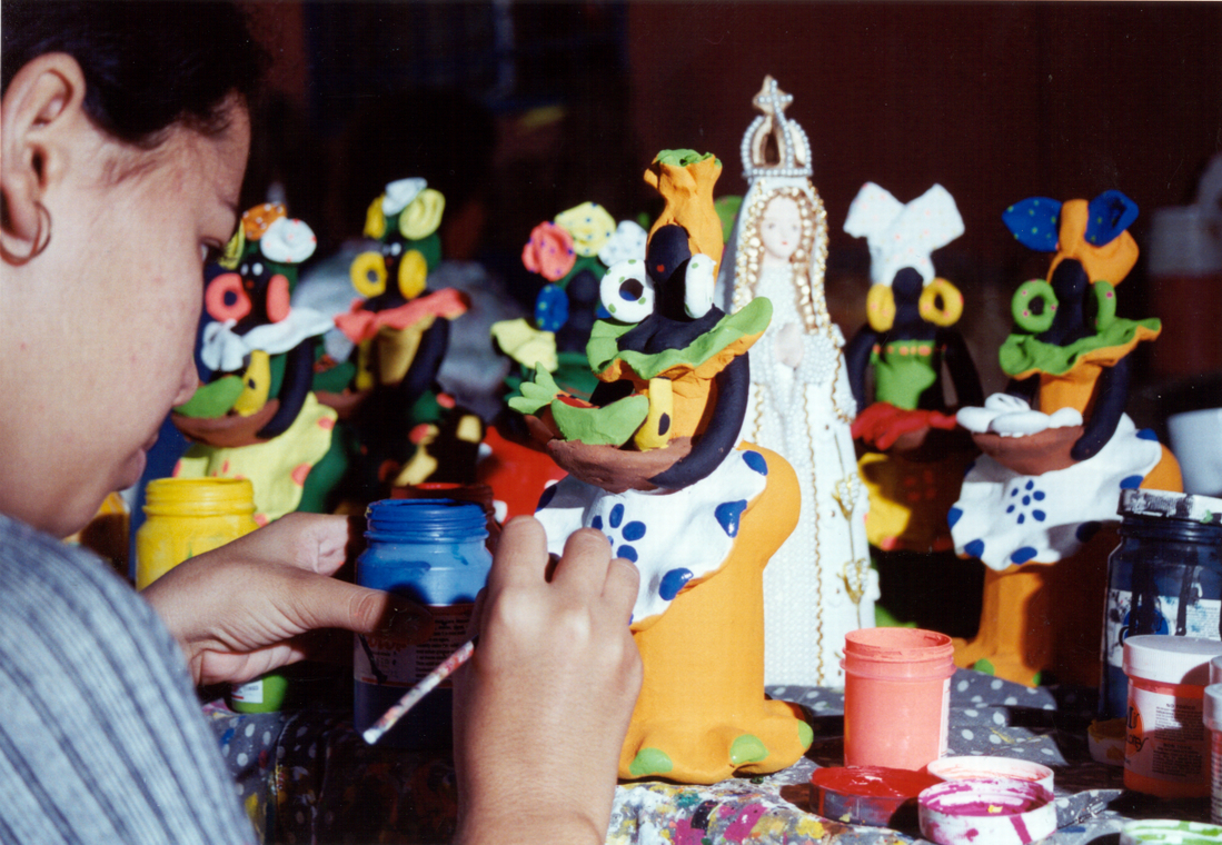 Trabajo de Artesanía del Cercado, Edo. Nueva Esparta, Venezuela